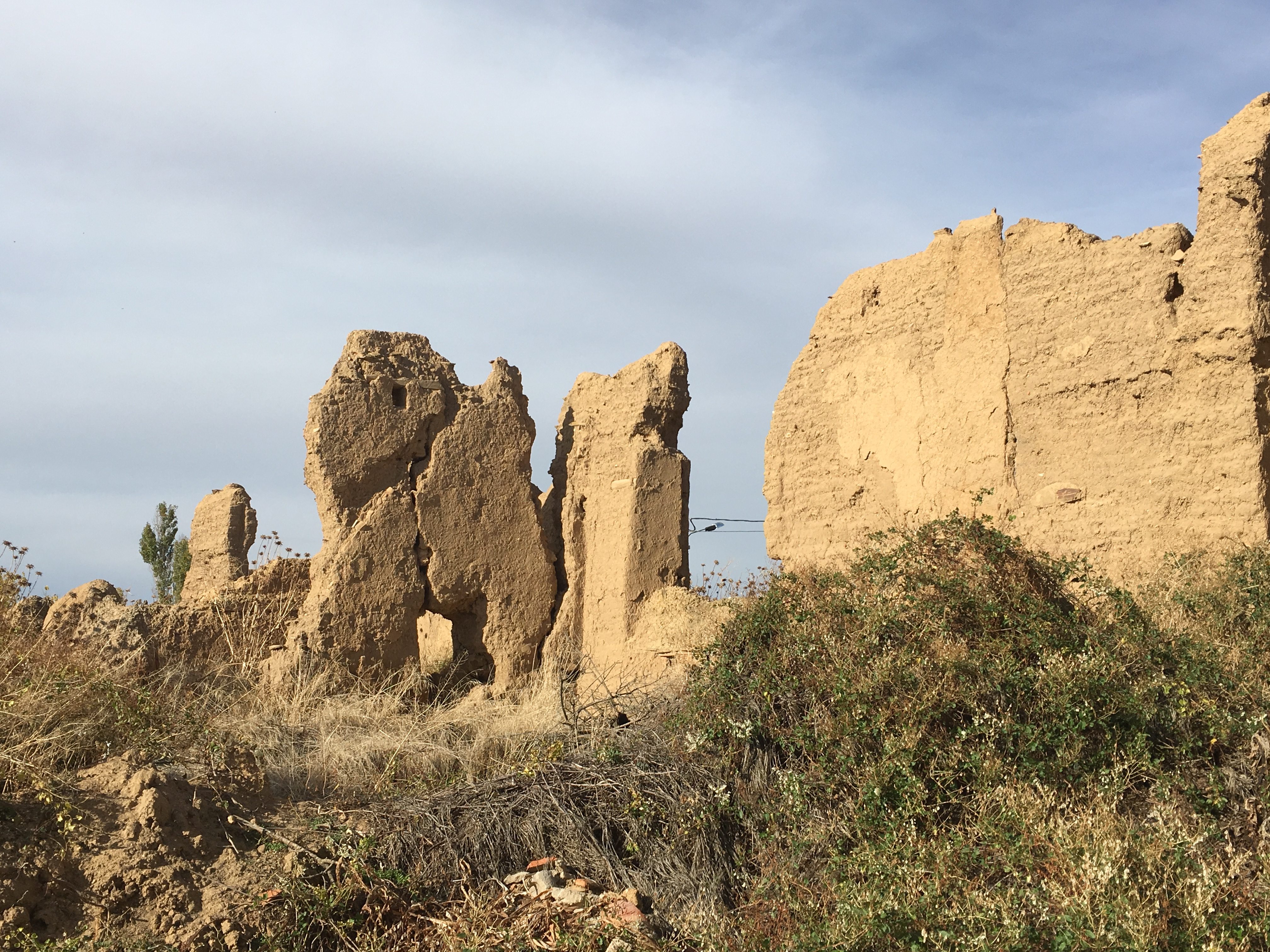 Villaesper Milenario